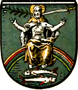 Herb wsi Wierzbno, gmina Warnice.